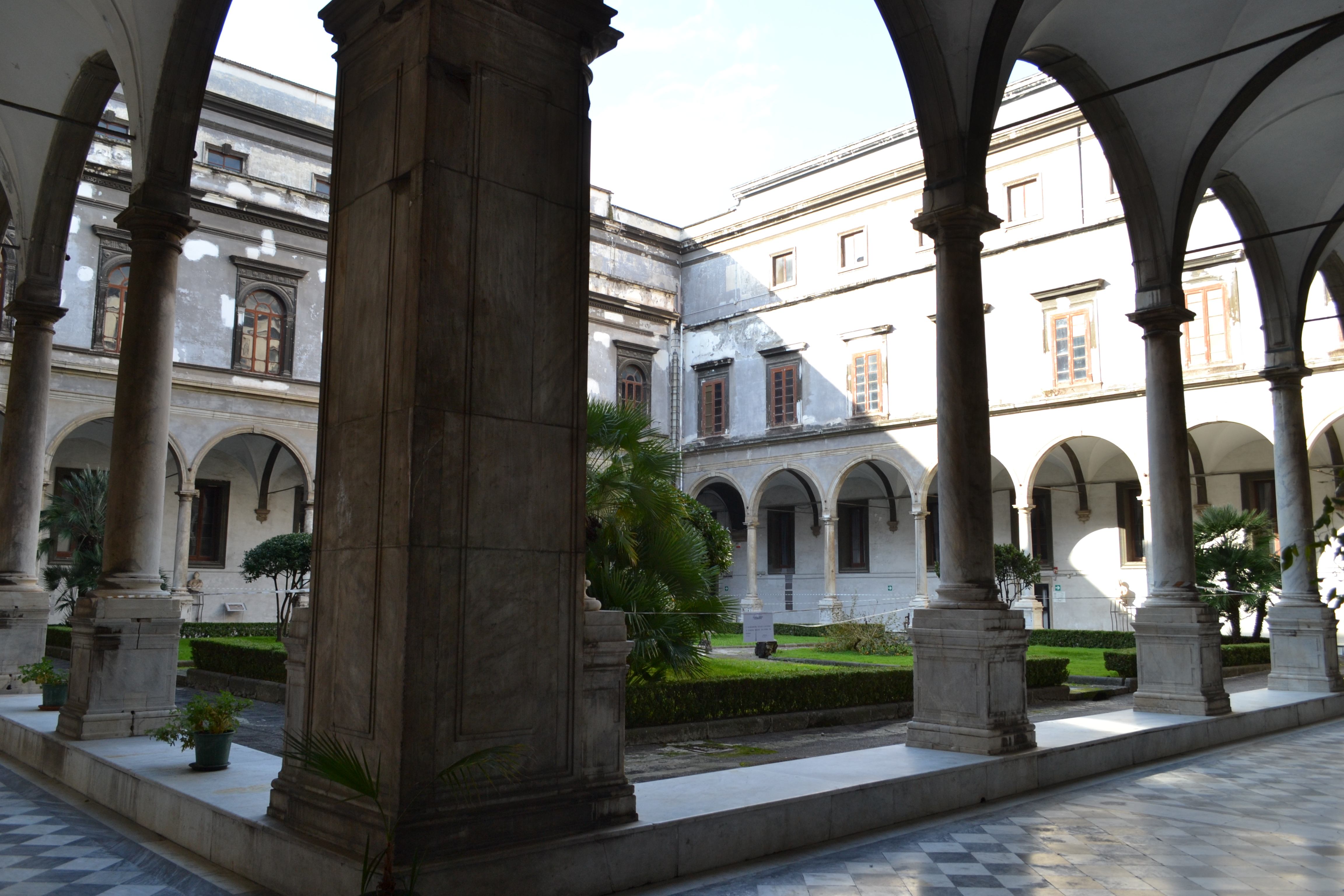 Chiostro grande (o di marmo) - Convento dei Santi Severino e Sossio